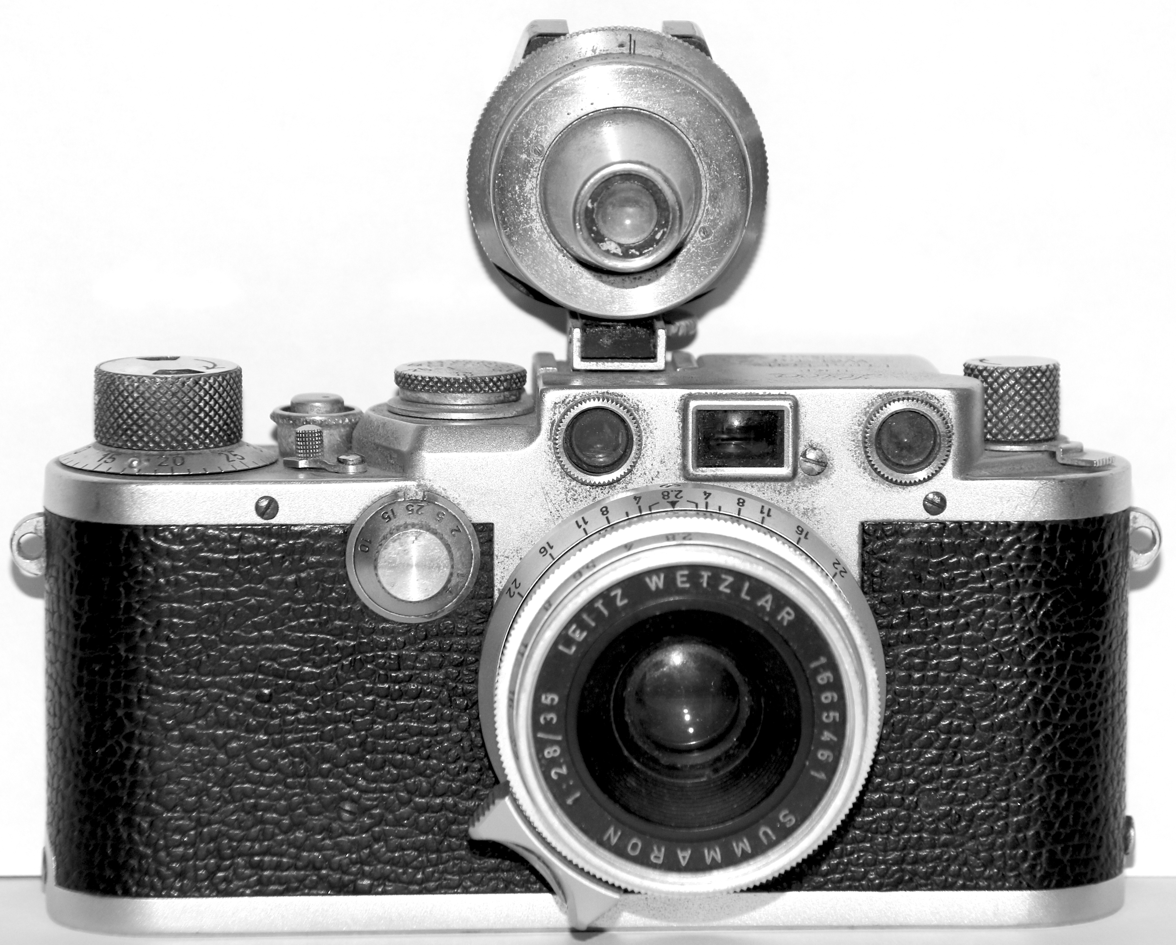 Leica Nr. 619125 Holler Swakopmund